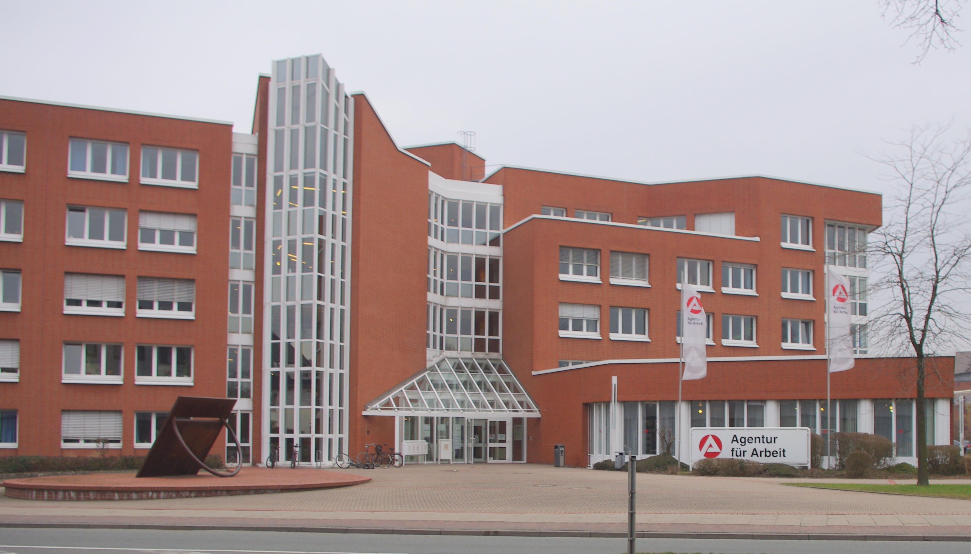 Gebäude der Agentur fuer Arbeit Herford